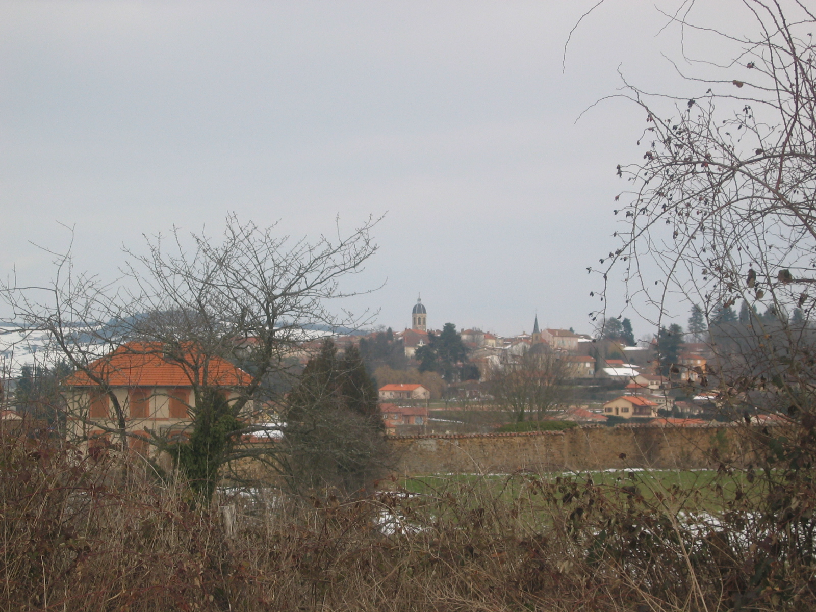 Vue générale